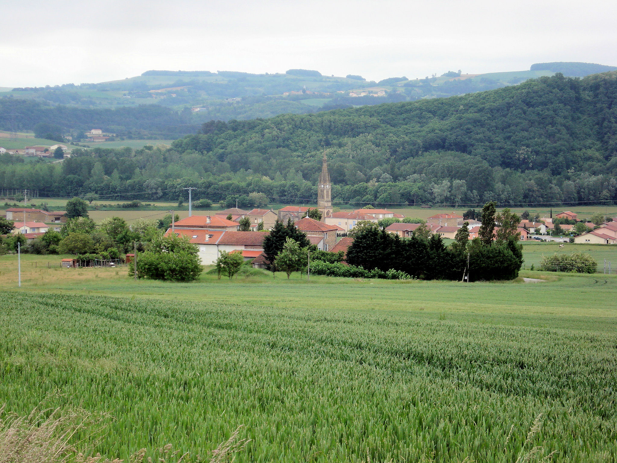 Mureils dans la Drôme